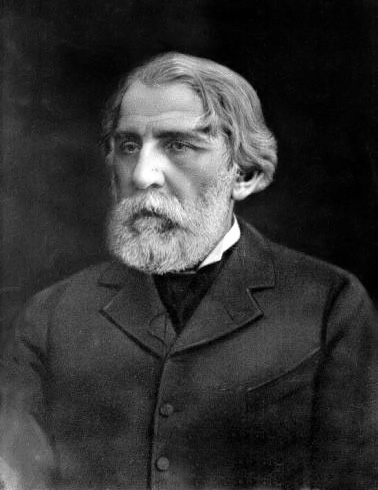 Портрет писателя И. С. Тургенева (репродукция). Санкт-Петербург, 1914.